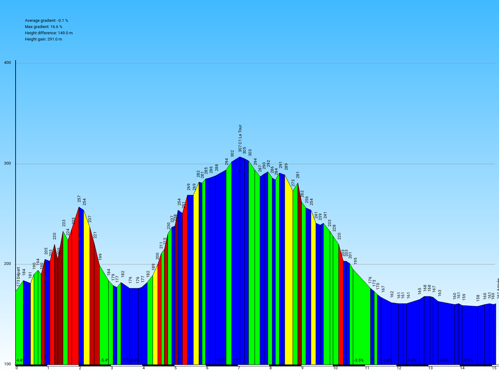 0% → Bleu 3% → Vert 6% → Jaune 9% → Rouge 12% → Rouge foncé 15% → Rouge très foncé 18% → Rouge extrêmement foncé Réalisé avec Cyclograph 1.7.1